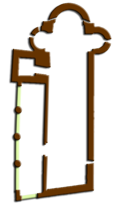 Retoc d'una planta per tal de fer-la més petita i pràctica.